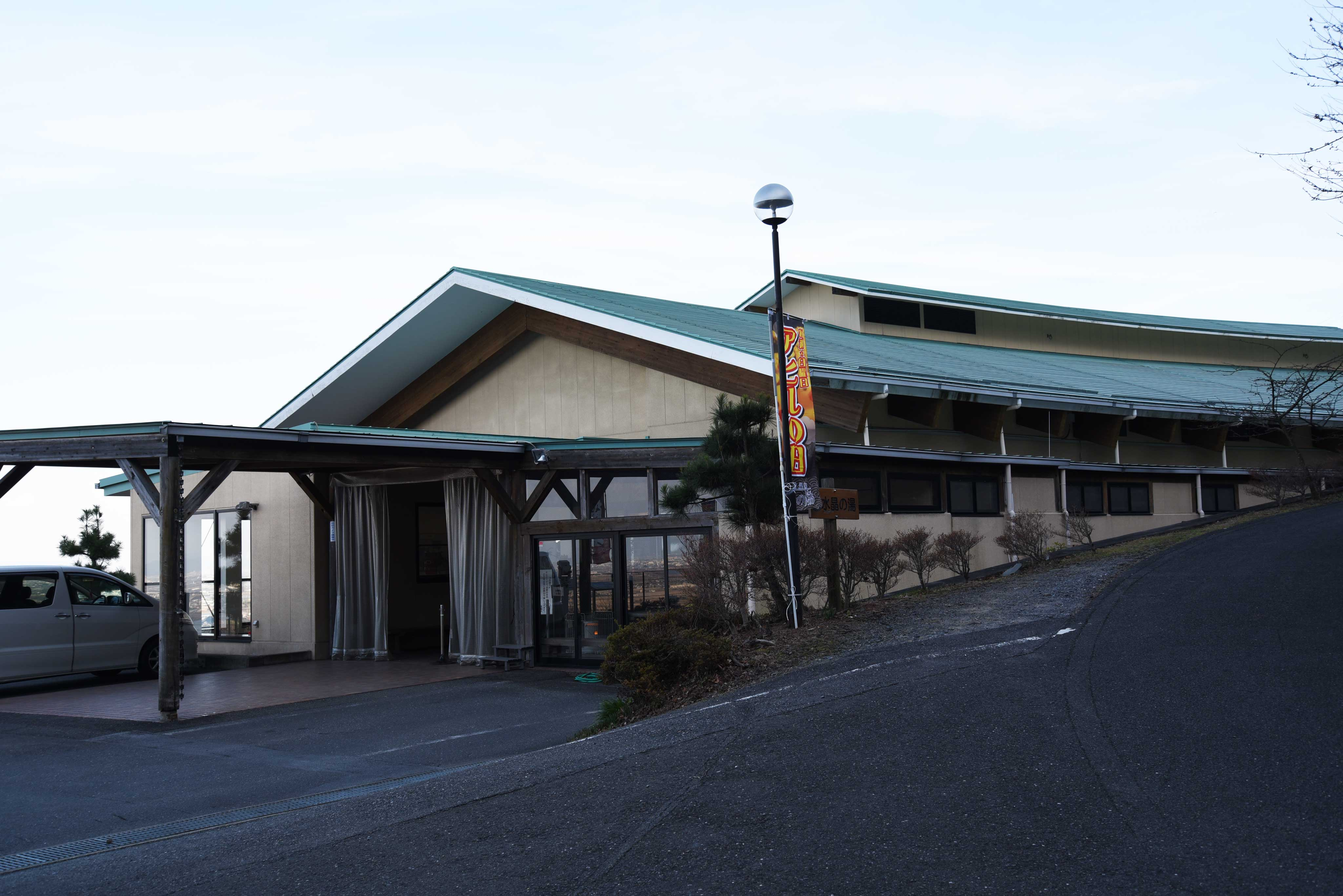 南濃温泉全景